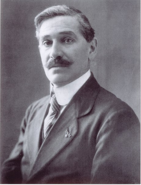 Albert Samama-Chikli (1872 - 1934), pionnier du cinéma tunisien.